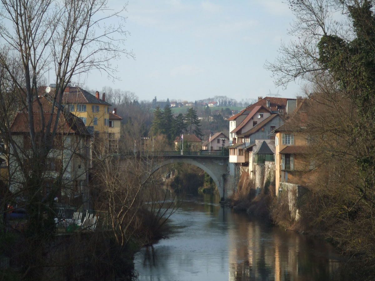 Le pont sur le Guiers, entre les départements français de l'Isère (à gauche) et de la Savoie (à droite).